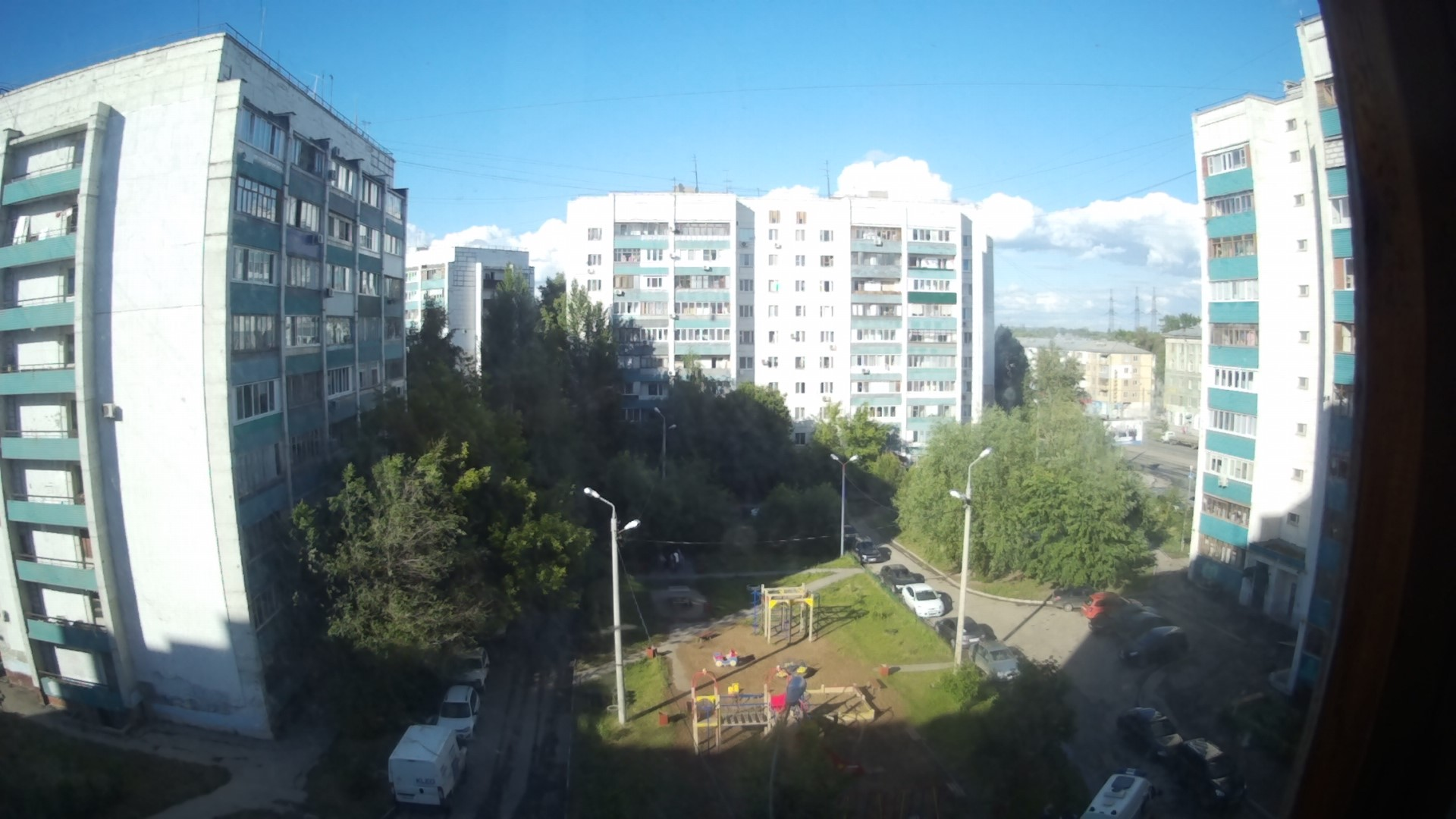 Летом гулял по улице и фотографировал все подряд.